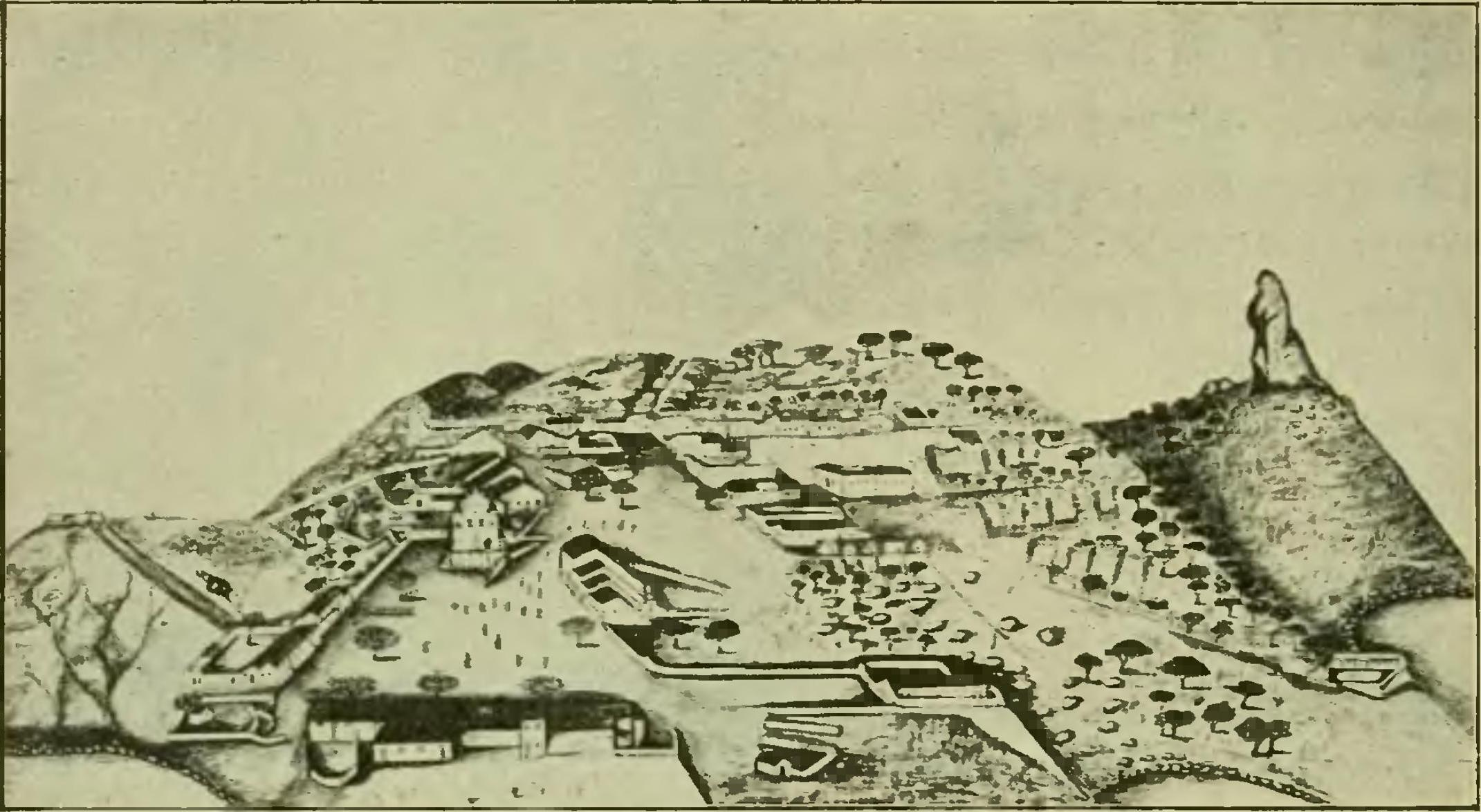 Desenho da Ilha de Fernando de Noronha, Brasil